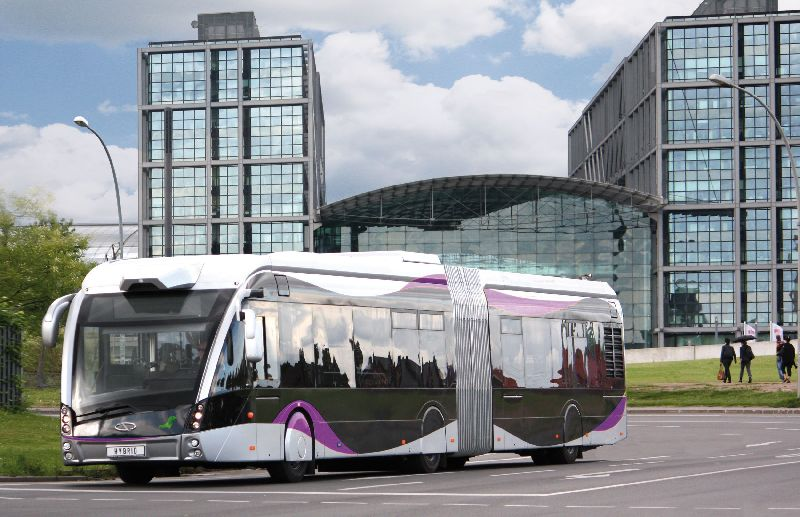 18 hybrid metrostyle